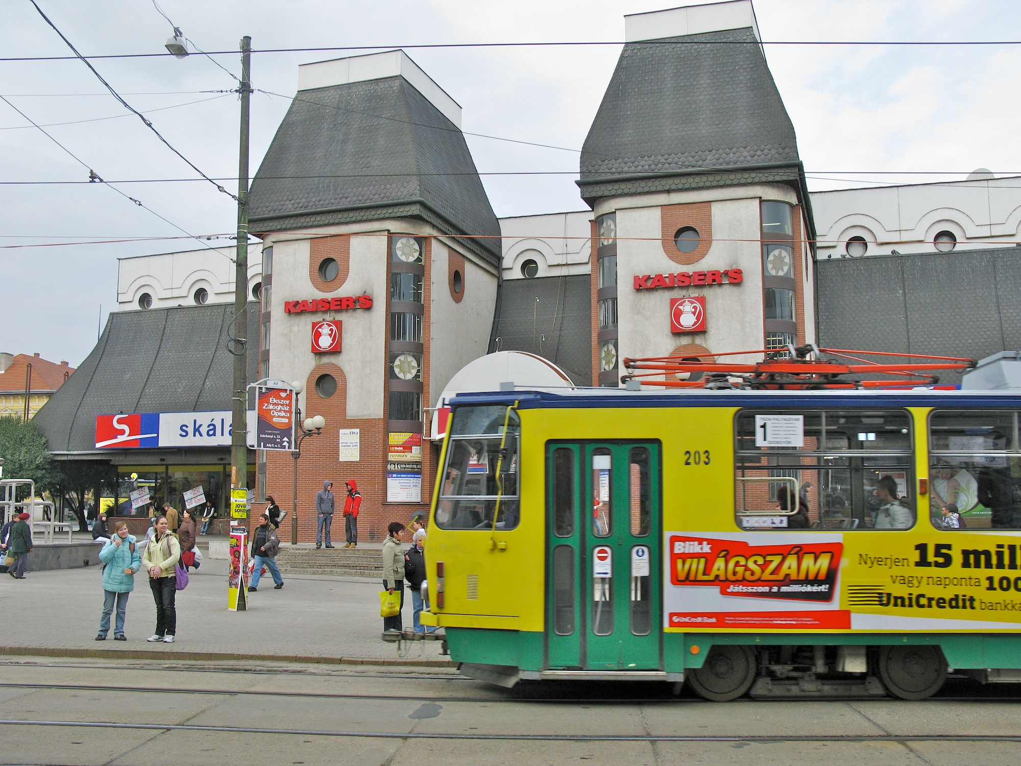 Tatra KT8D5 in Miskolc, Hungary